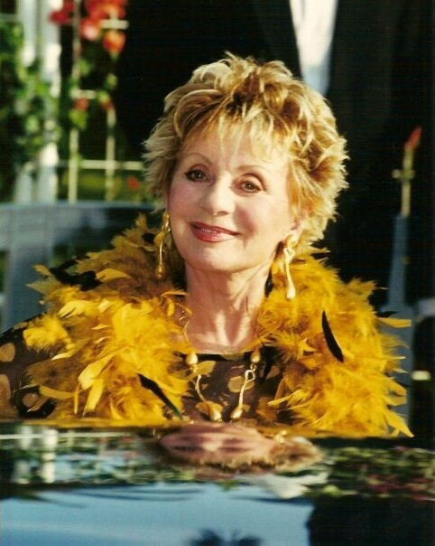 Annie Cordy au festival de Cannes